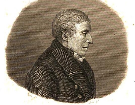 Imagen de Lagasca publicada en 1842.